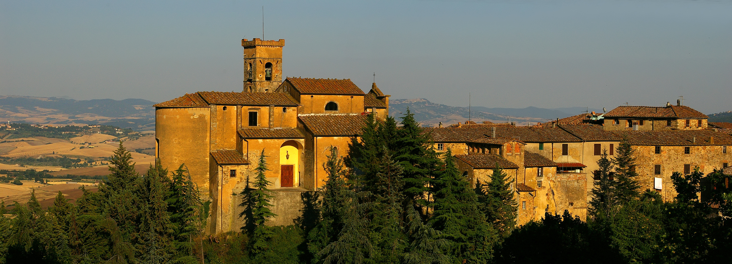 Chianni (fotocomposizione)